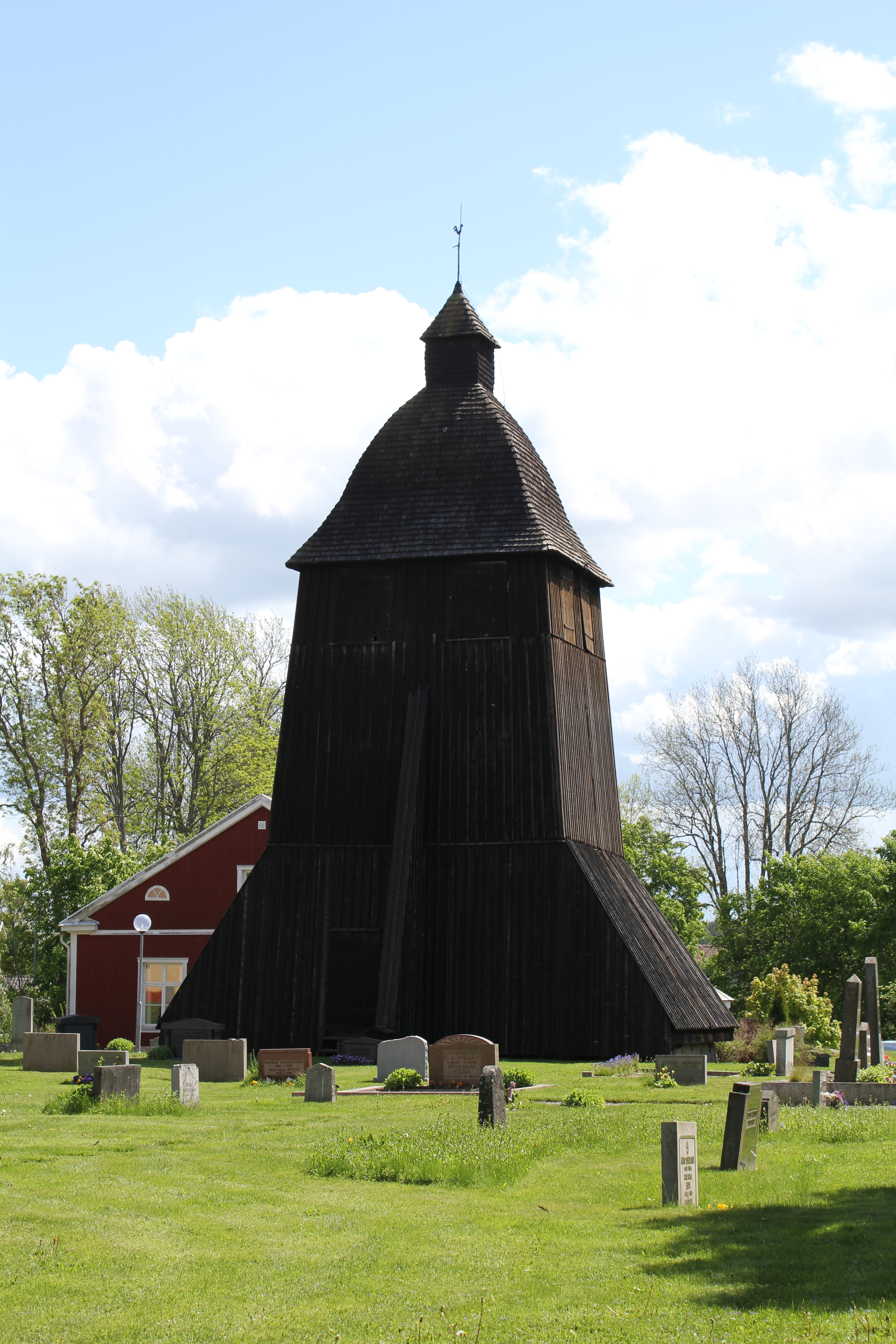 Klockstapel utanför Boglösa kyrka, Enköpings kommun. Foto av uppladdaren.